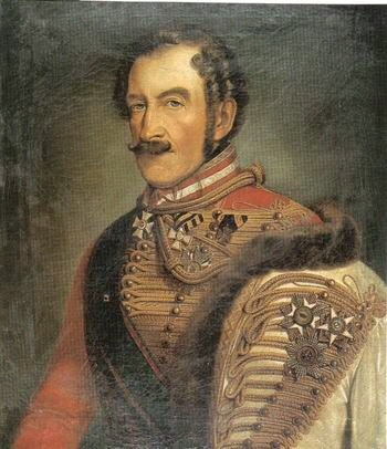 Fernando de Saxe-Coburgo-Gota (1785-1851)